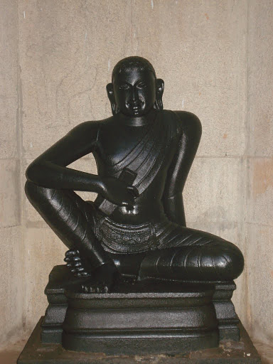 தமிழ்த்தாய் கோயிலில் காணப்படும் இளங்கோடிவகள் சிலை